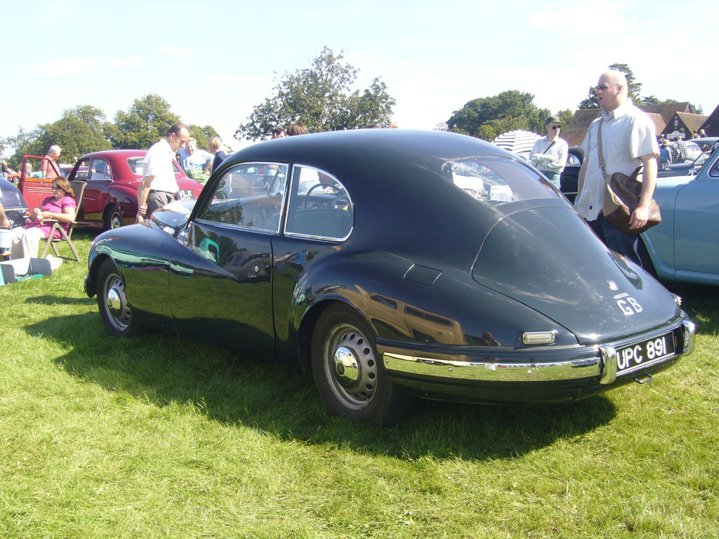 Bristol 403 - 2 litre